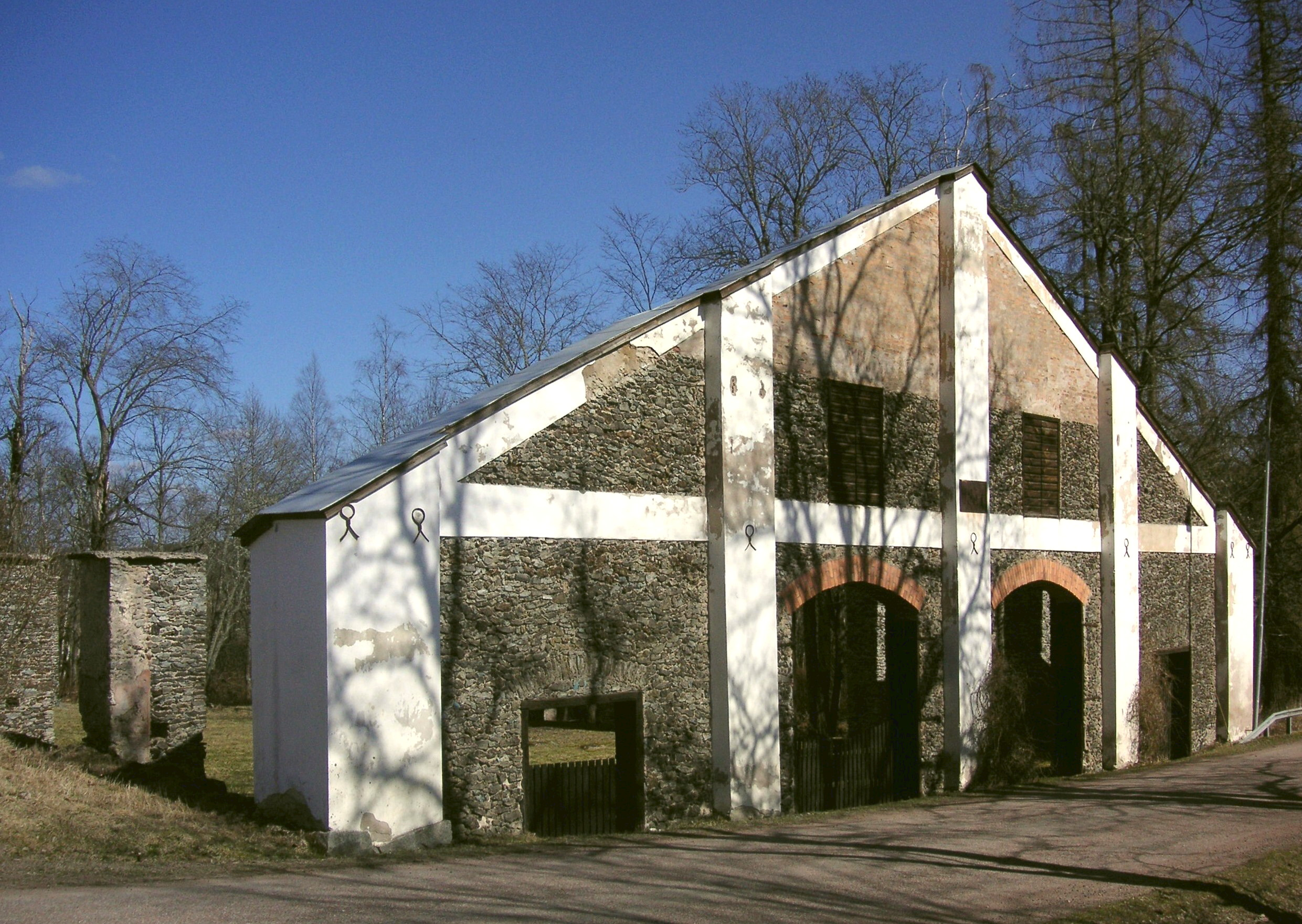 Grängshammars bruk, Dalarna, kolhuset